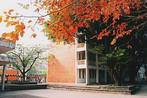 Hình ảnh về khuôn viên trường Đại học Ngoại ngữ - Đại học Quốc gia Hà Nội